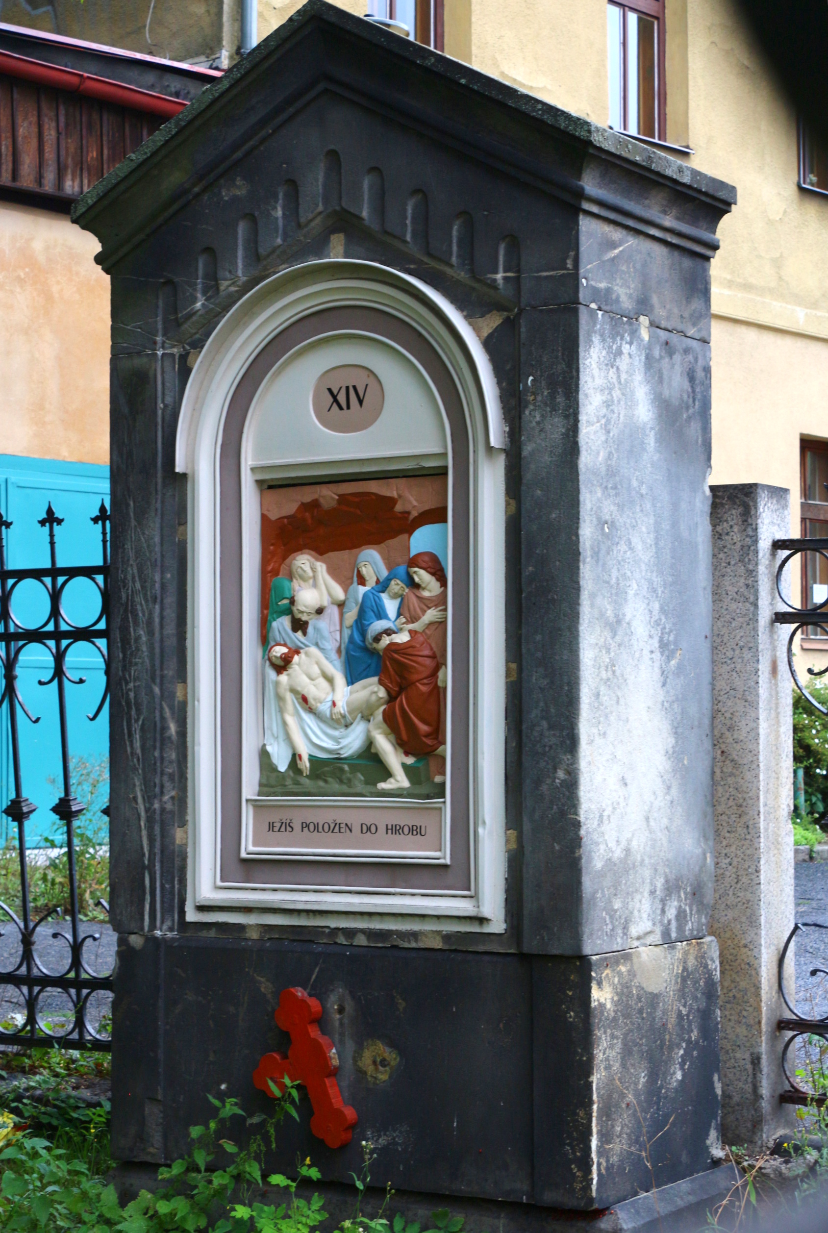 Liberecký kostel Nalezení sv. Kříže